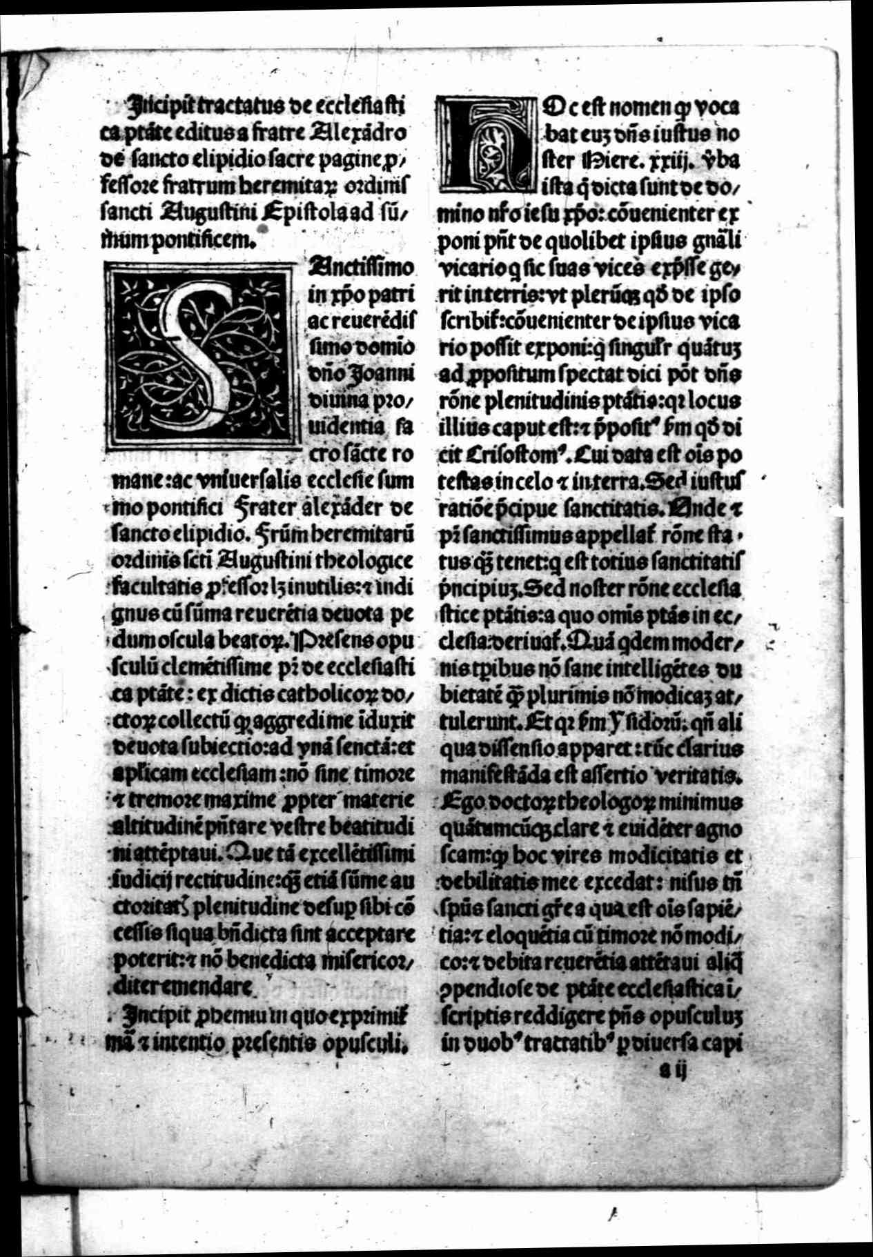 Carta a2r